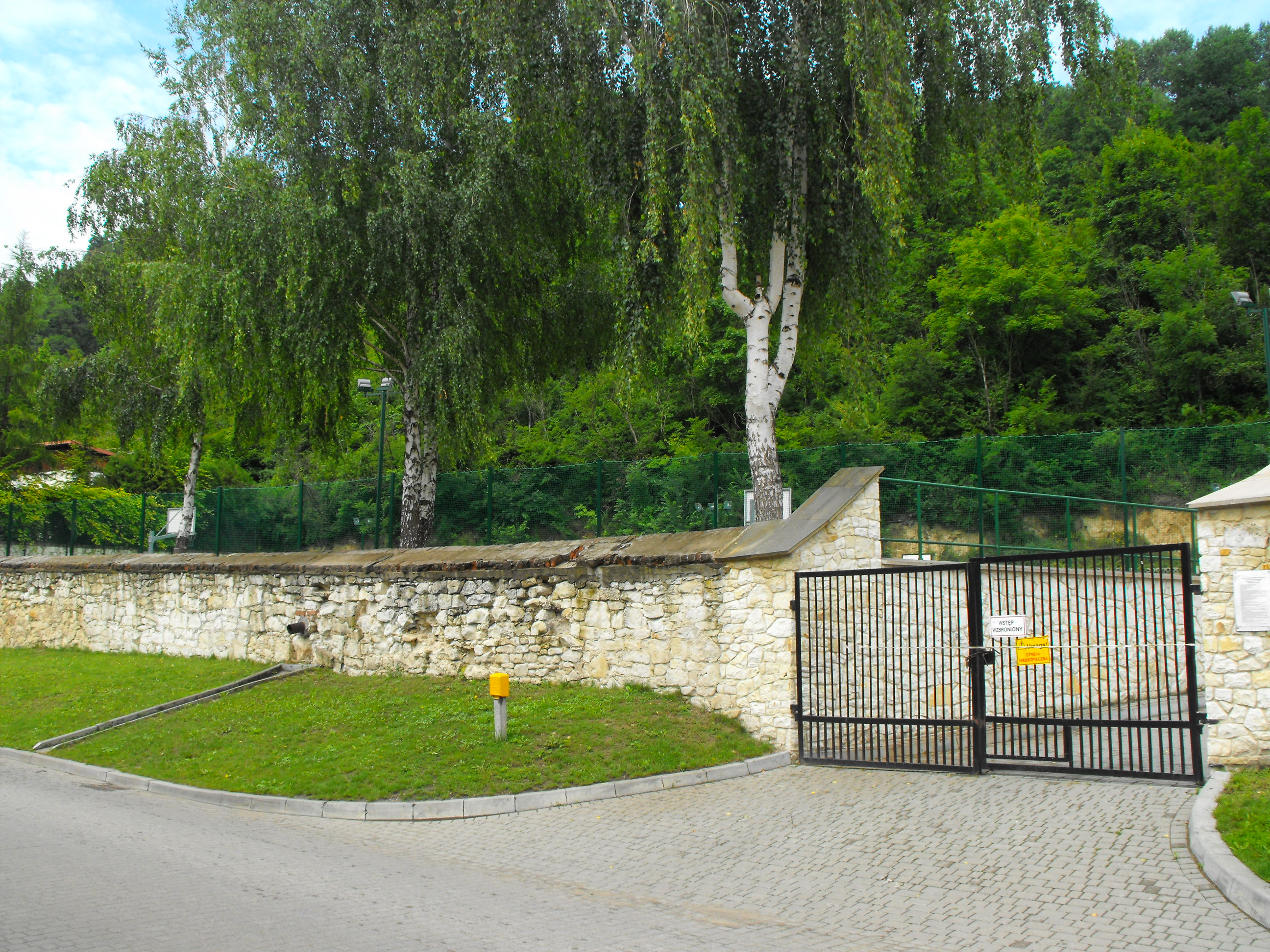 Бывшее еврейское кладбище Казимежа-Дольного, ныне - школьный стадион